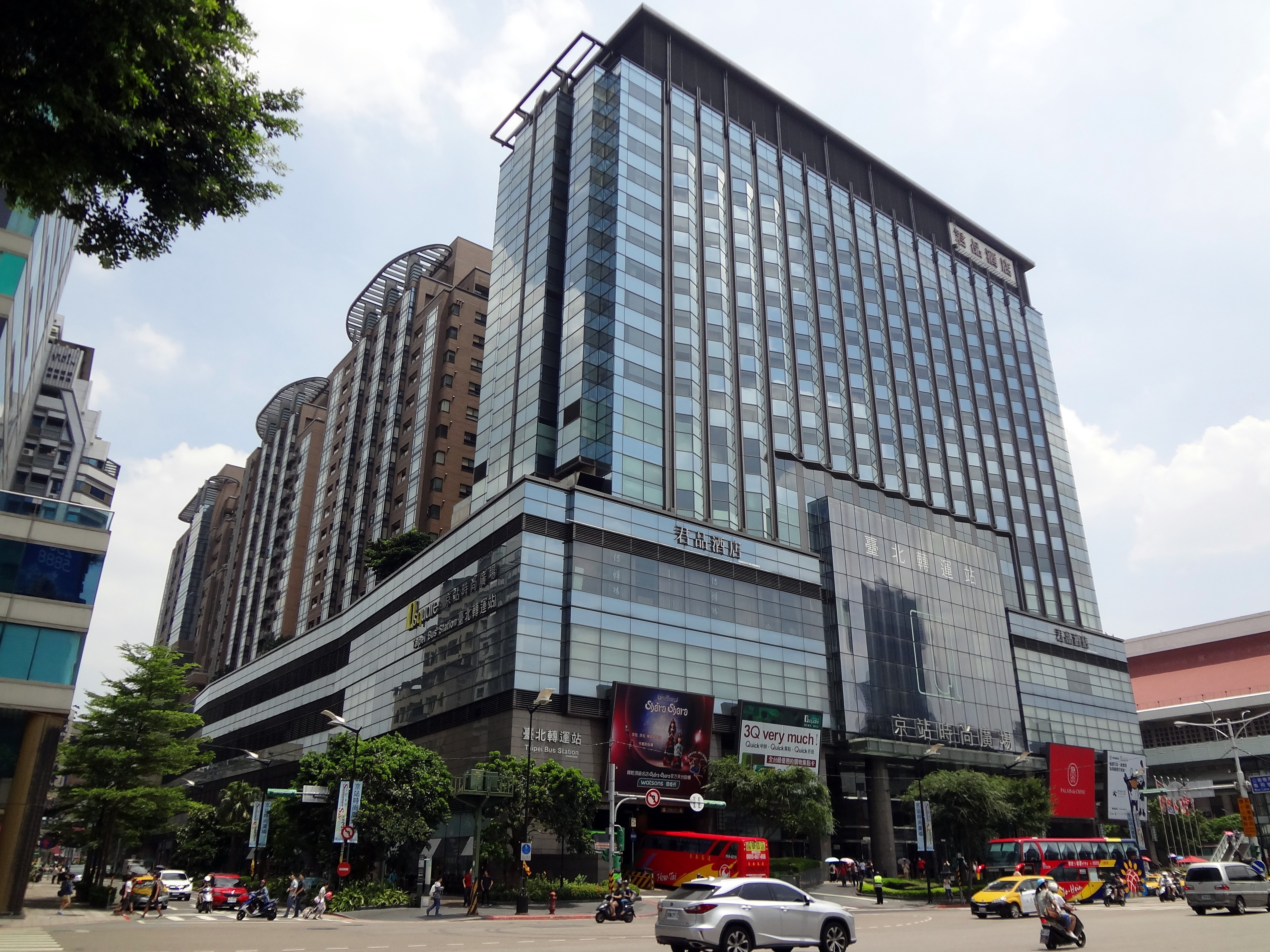 京站大樓，位於臺北市大同區市民大道一段、承德路口。